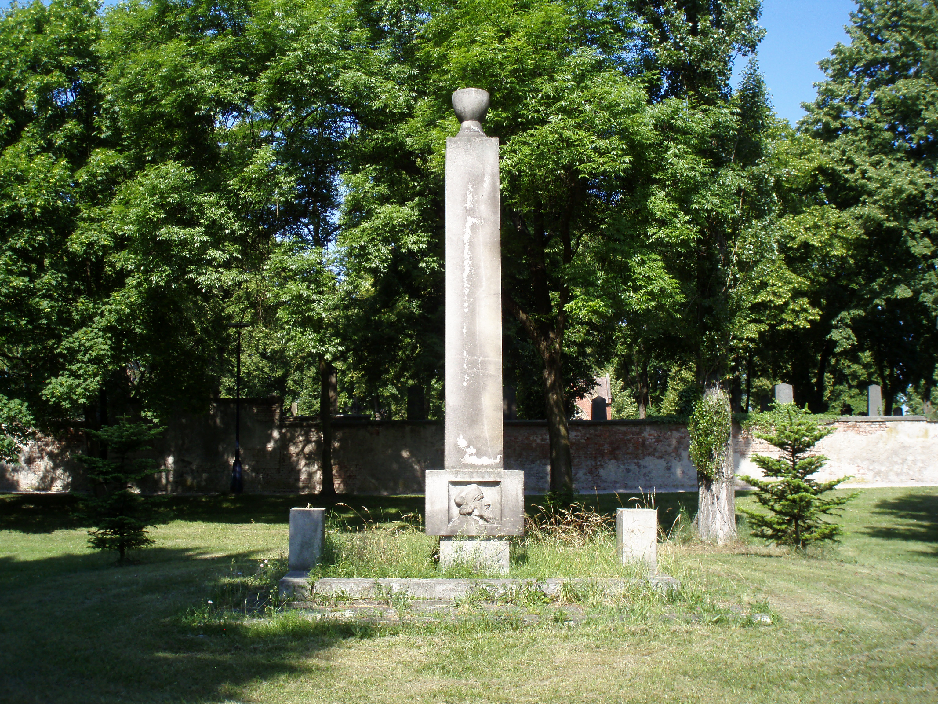 Pomník J. Husa na Pouchově